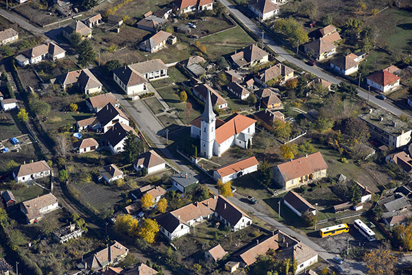 Tiszadob, katolikus templom